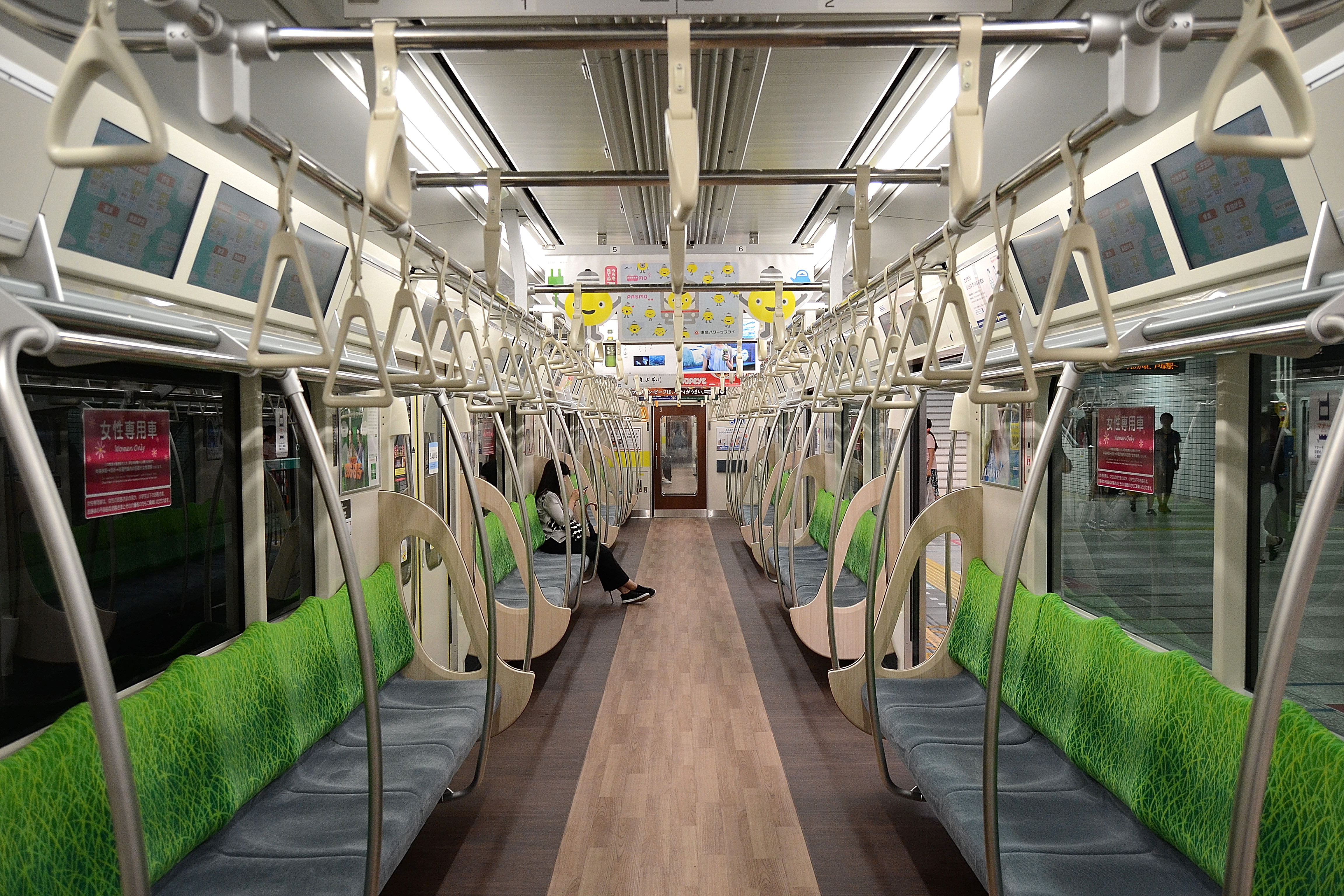 東急2020系の車内